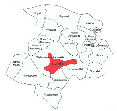 Mapa sołectw gminy Łasin